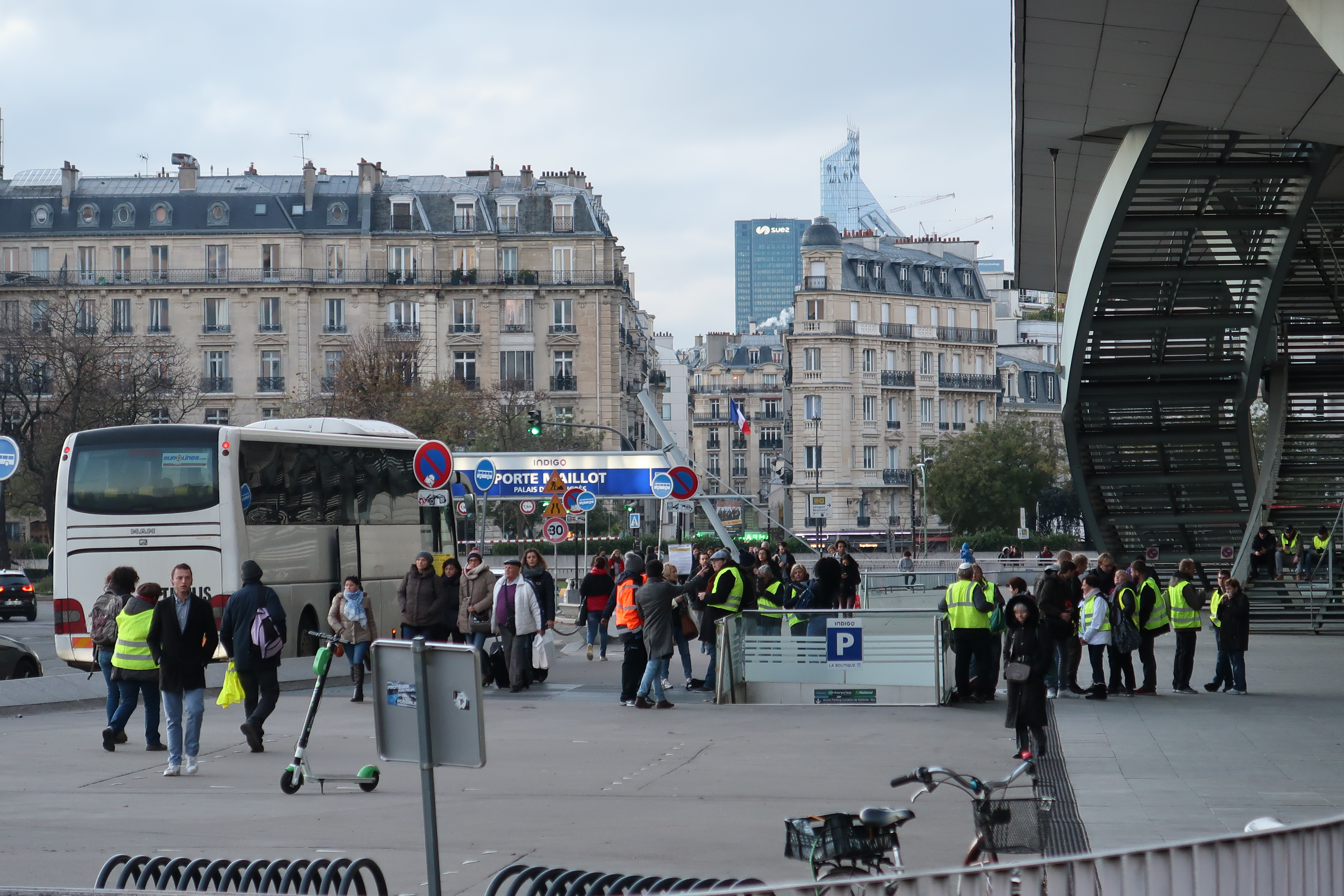 Gilets jaunes porte Maillot (Paris, 17e), le 24 novembre 2018.